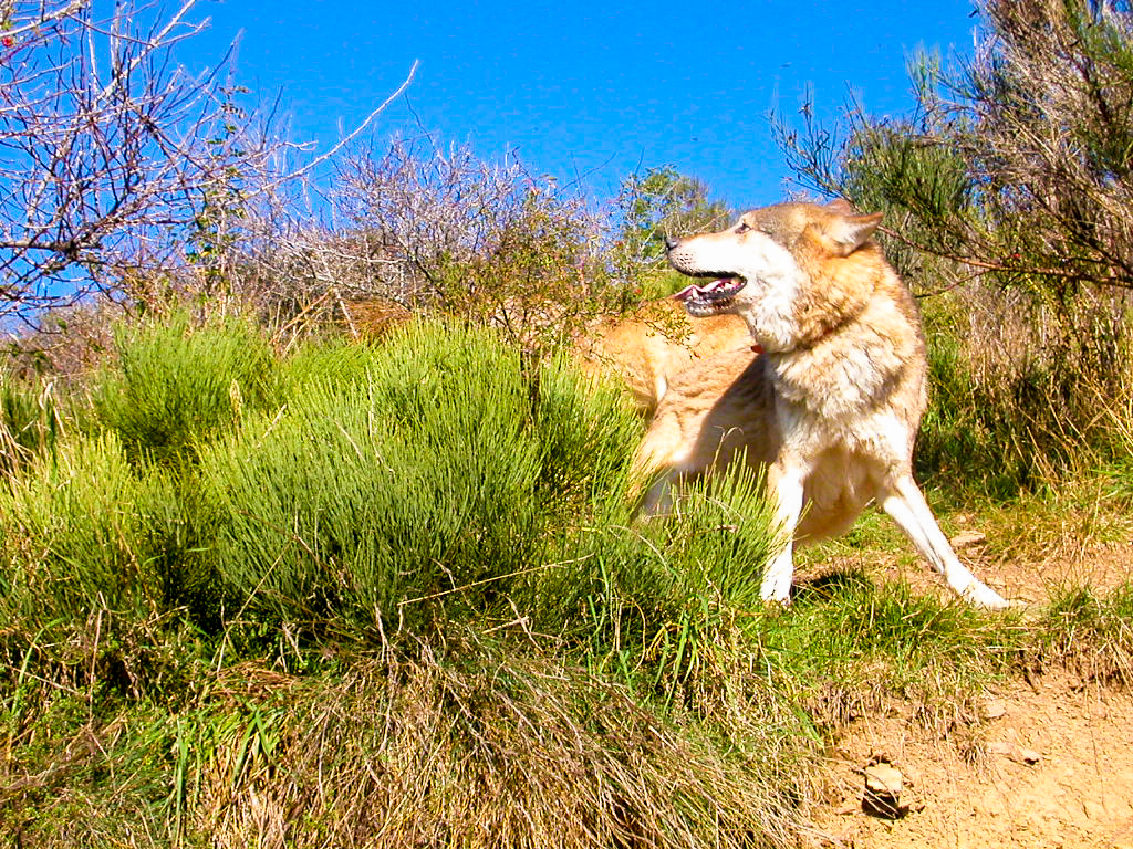 Loups de Mongolie recueillis par la Fondation Brigitte Bardot visibles dans le parc d'observation de 20 hectares dans le village de Sainte-Lucie